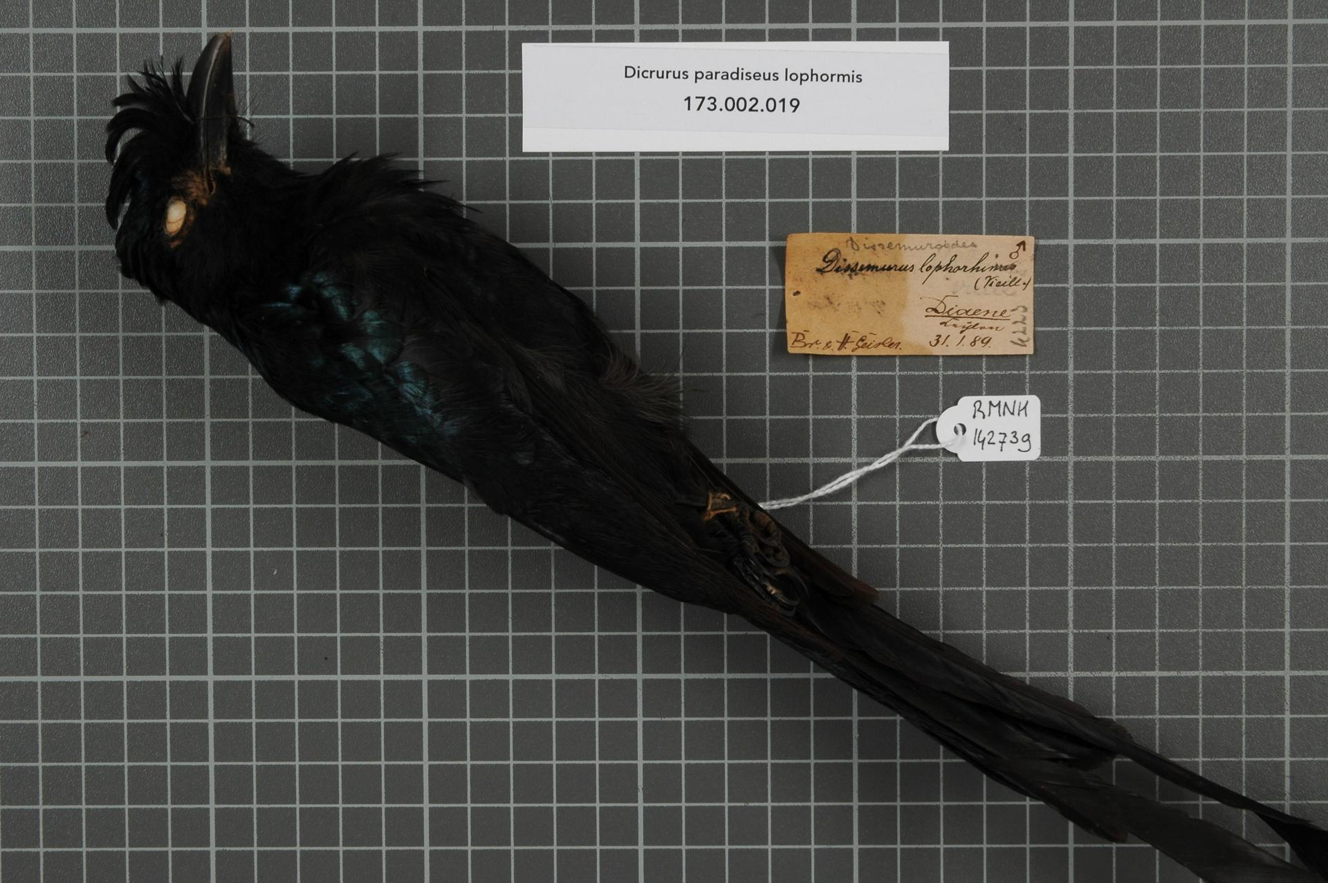 Dicrurus paradiseus lophormis Vieillot, 1817